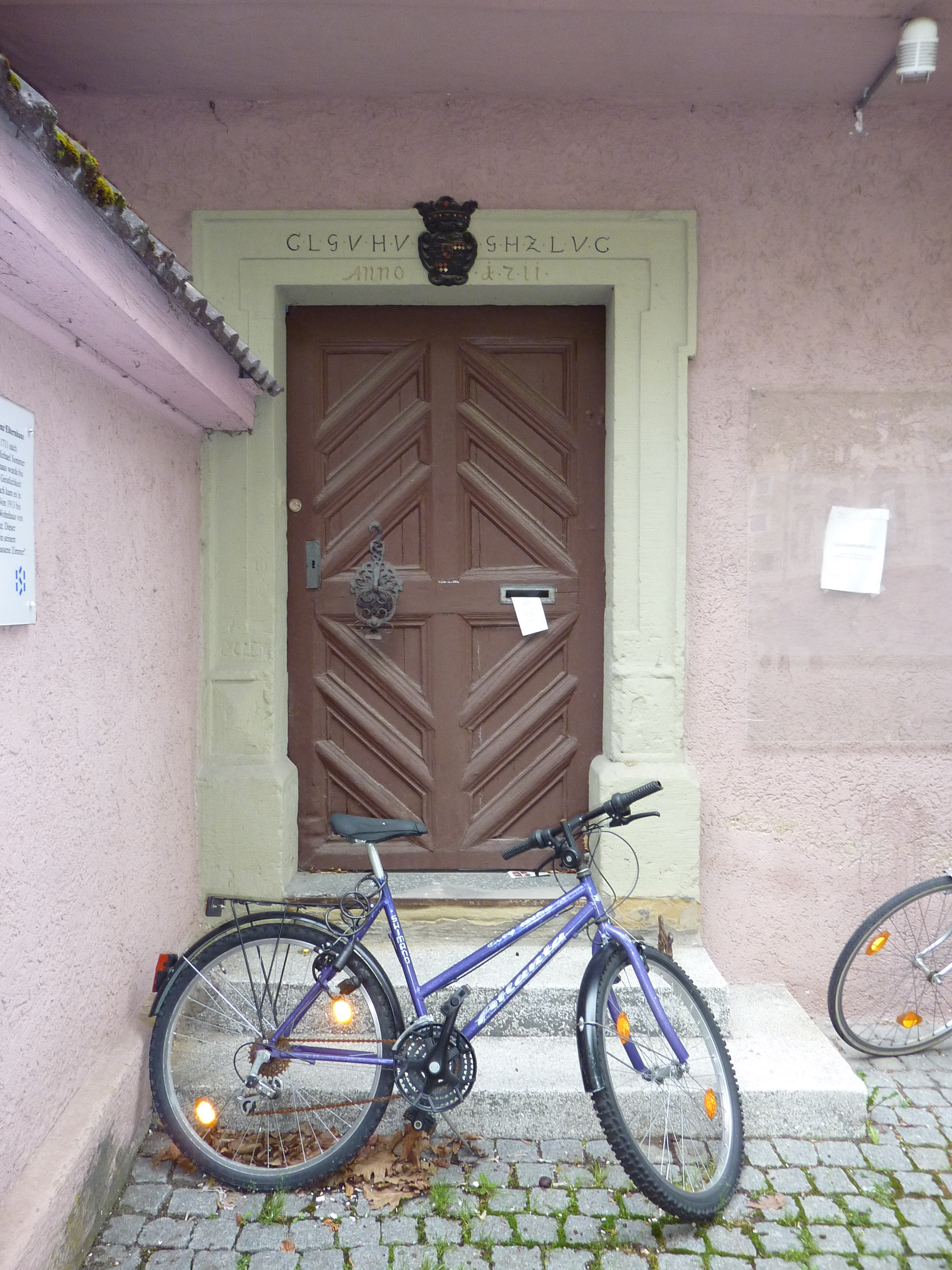 Tür des Hauses, in dem Hermann Lenz von 1913 bis 1923 lebte